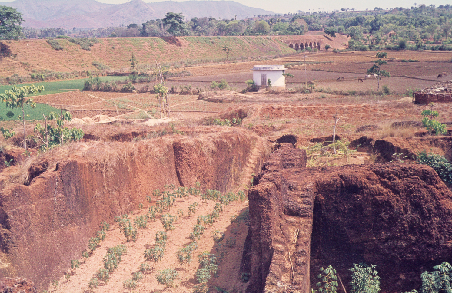 Abandoned laterite quarry at Angadipuram, Kerala, India.